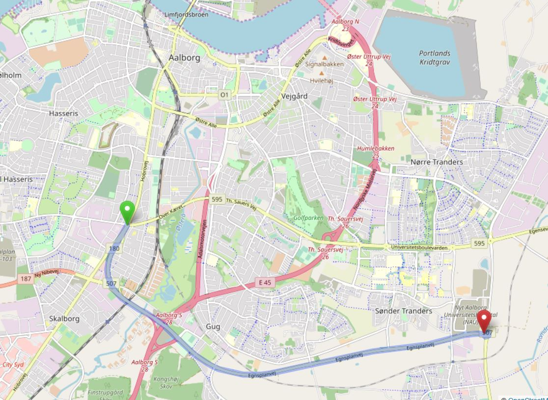 Forløbet af Egnsplanvej syd om Aalborg